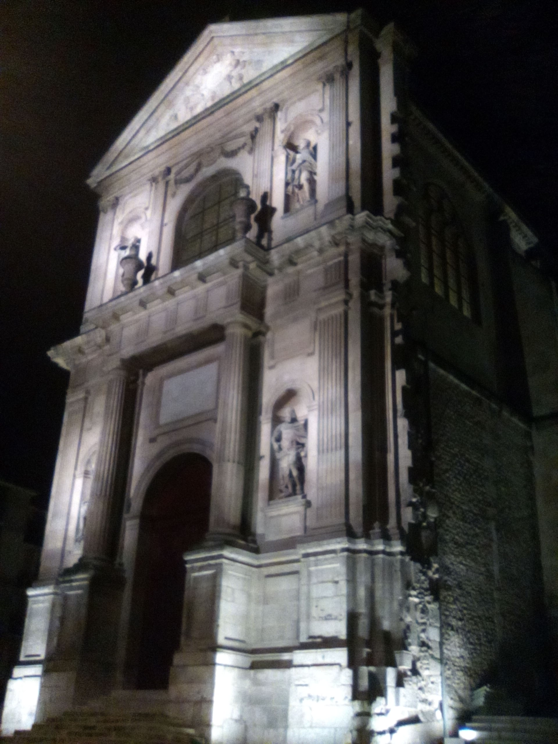 Façade de l'église Saint-Louis du lycée Corneille de Rouen, vue de nuit.